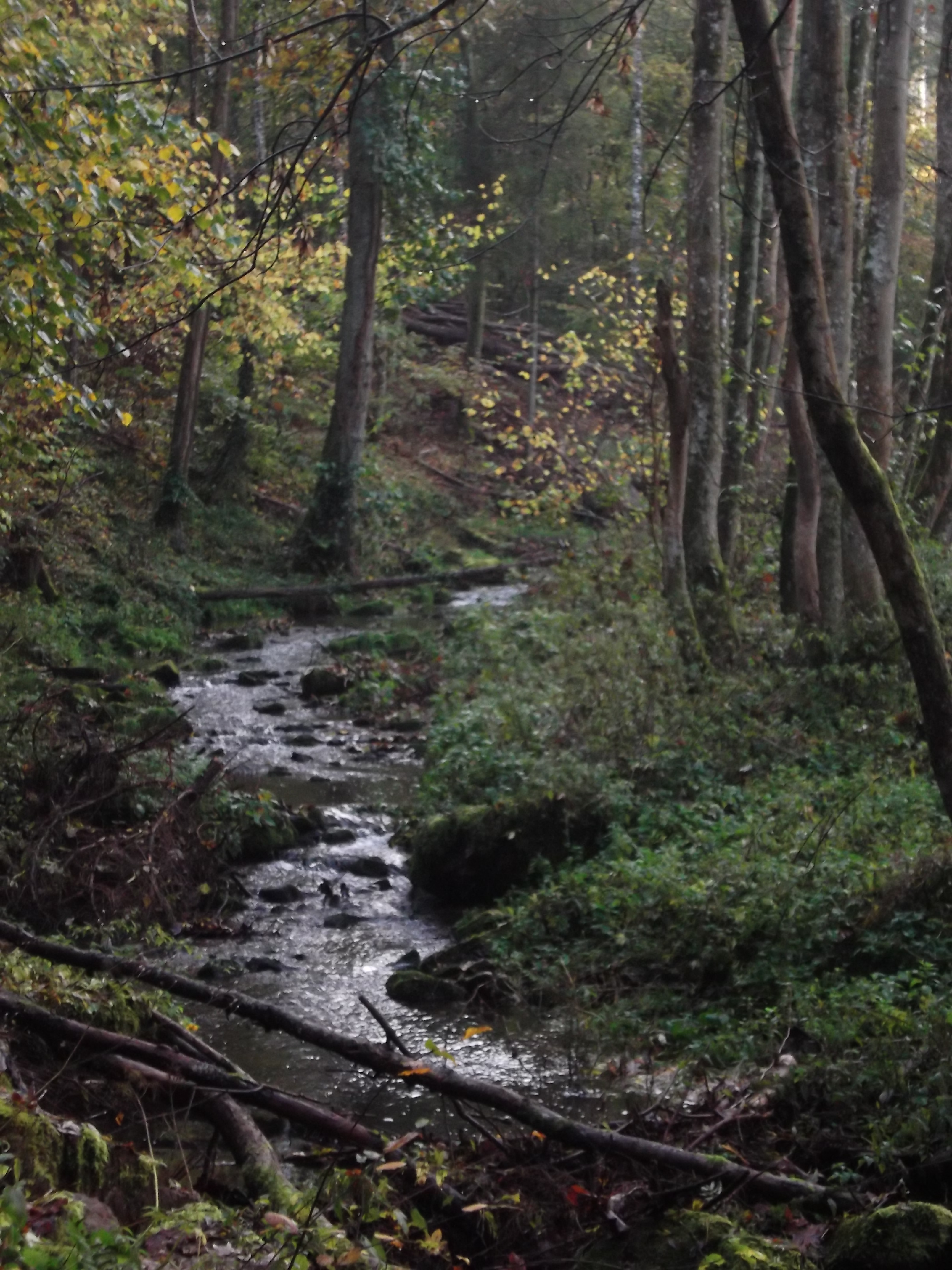 Mittellauf des Amorsbaches im Schönert.